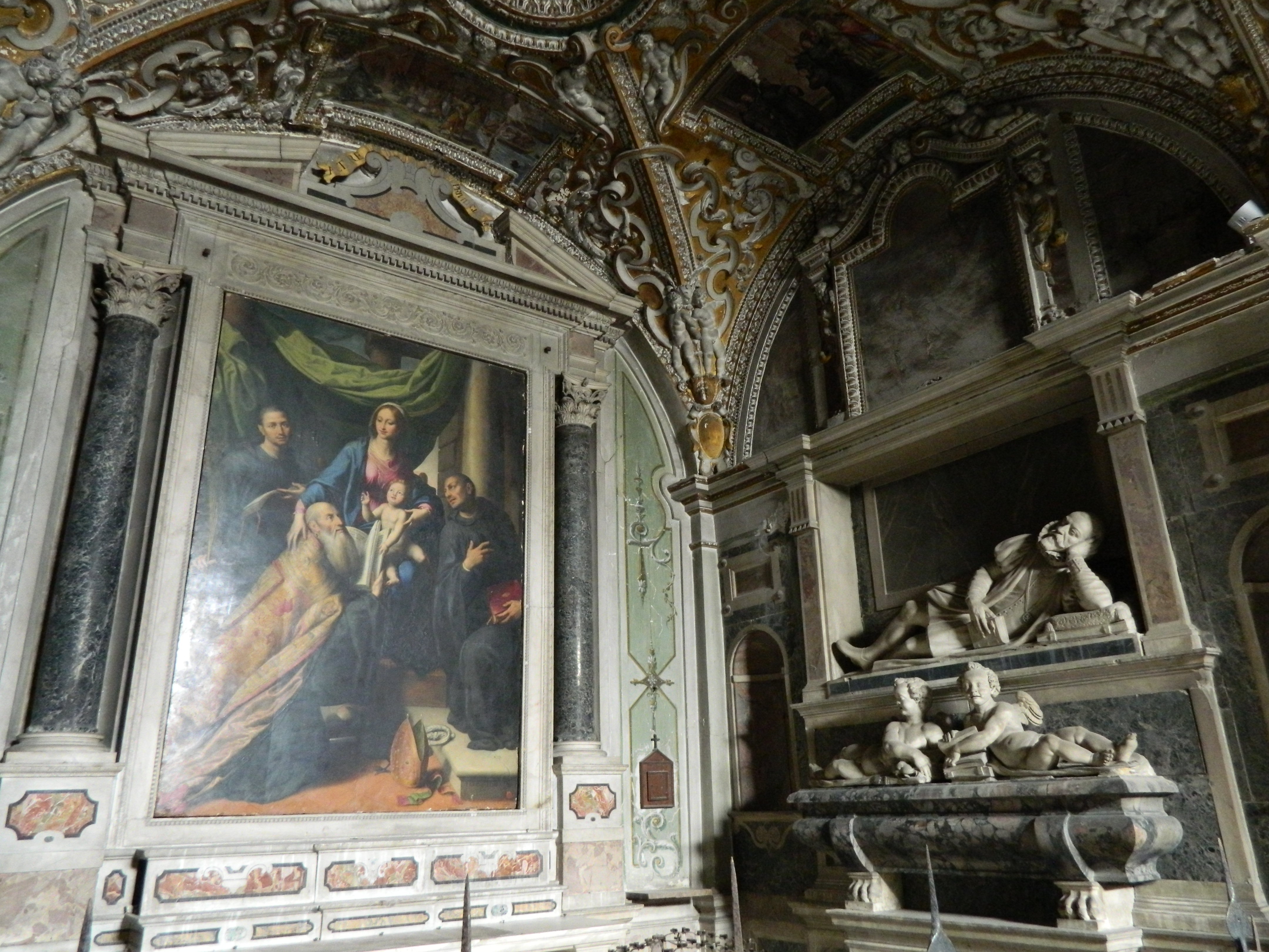 Cappella Medici di Ottaviano - Chiesa dei santi Severino e Sossio di Napoli